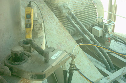 13.000 Nm Wechselkassetten-Hydraulikschrauber im Einsatz an Steinbrecher, die Mutter hat ein Mass von 95 MM